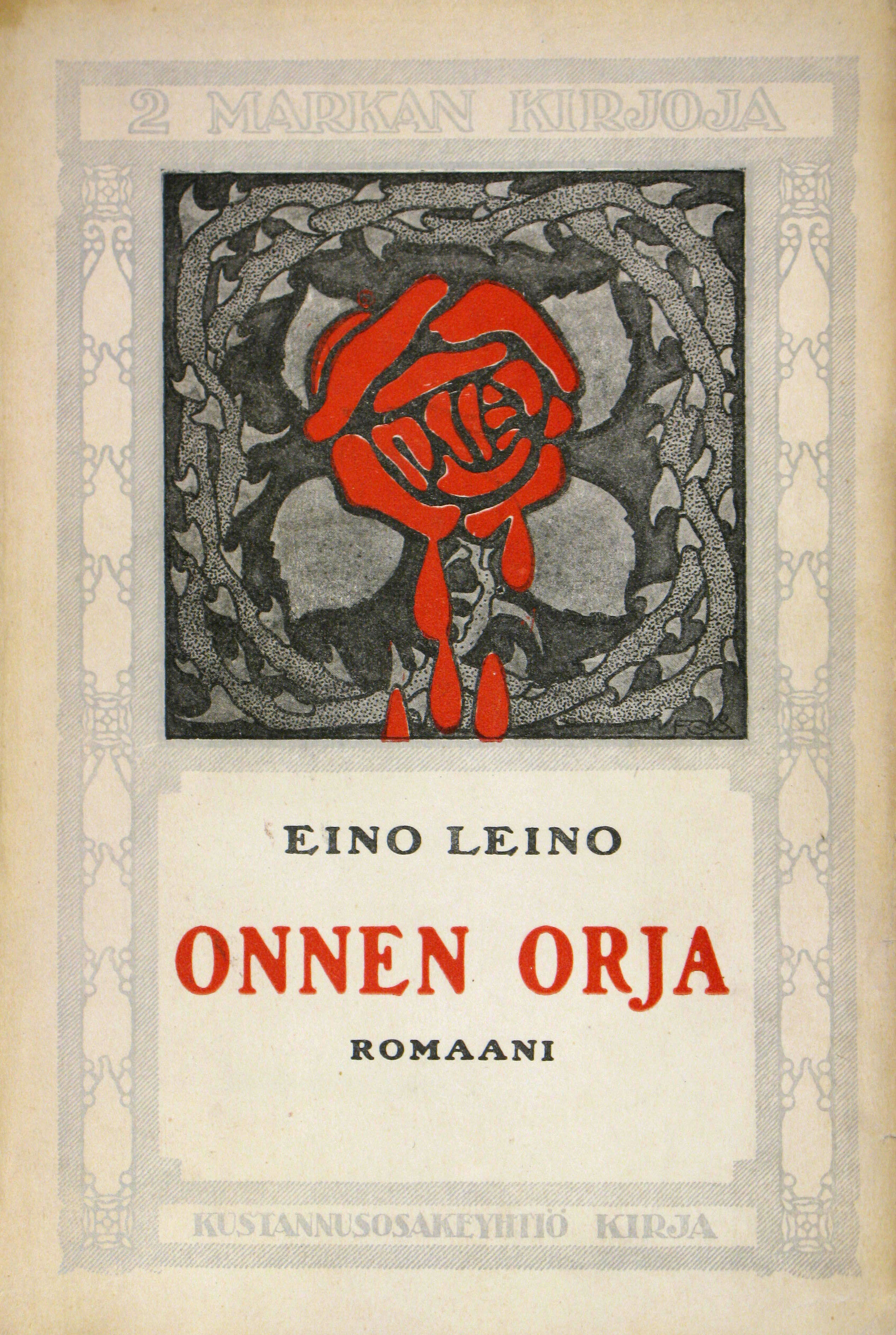 Eino Leinon romaanin "Onnen orja" (1913) kansisivu.